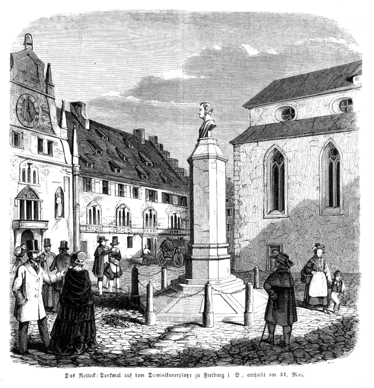 Rotteckdenkmal am Freiburger Rathausplatz